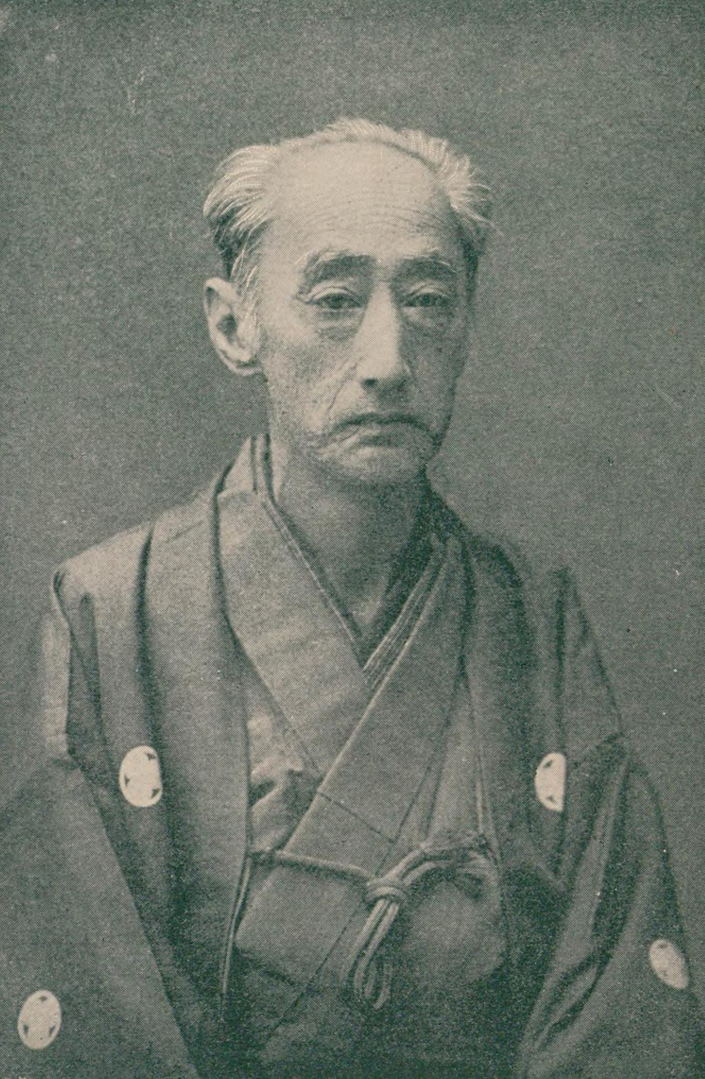 松平容保（会津中将）